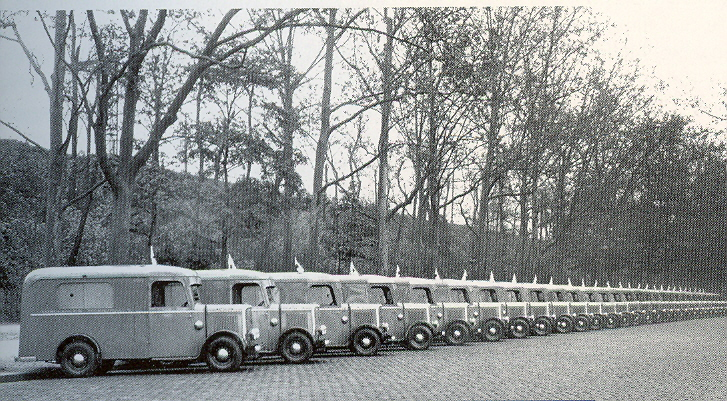 Panhard & Levassor ambulance cars ZUVIT (1934)